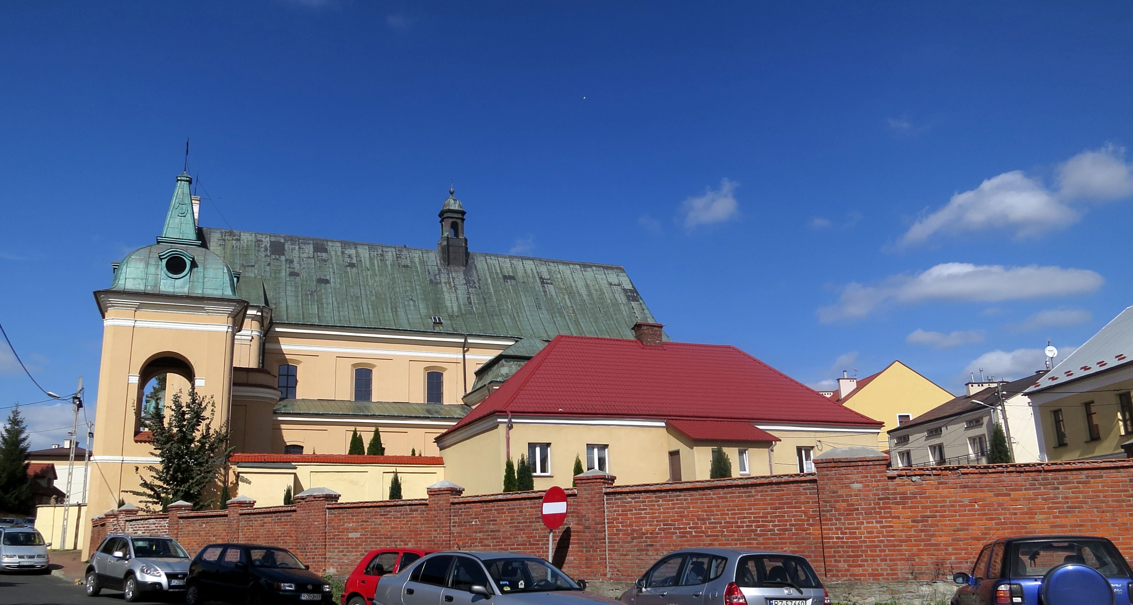 Tyczyn, zespół kościoła par. p.w. Wniebowzięcia NMP i św. Katarzyny, XVIII